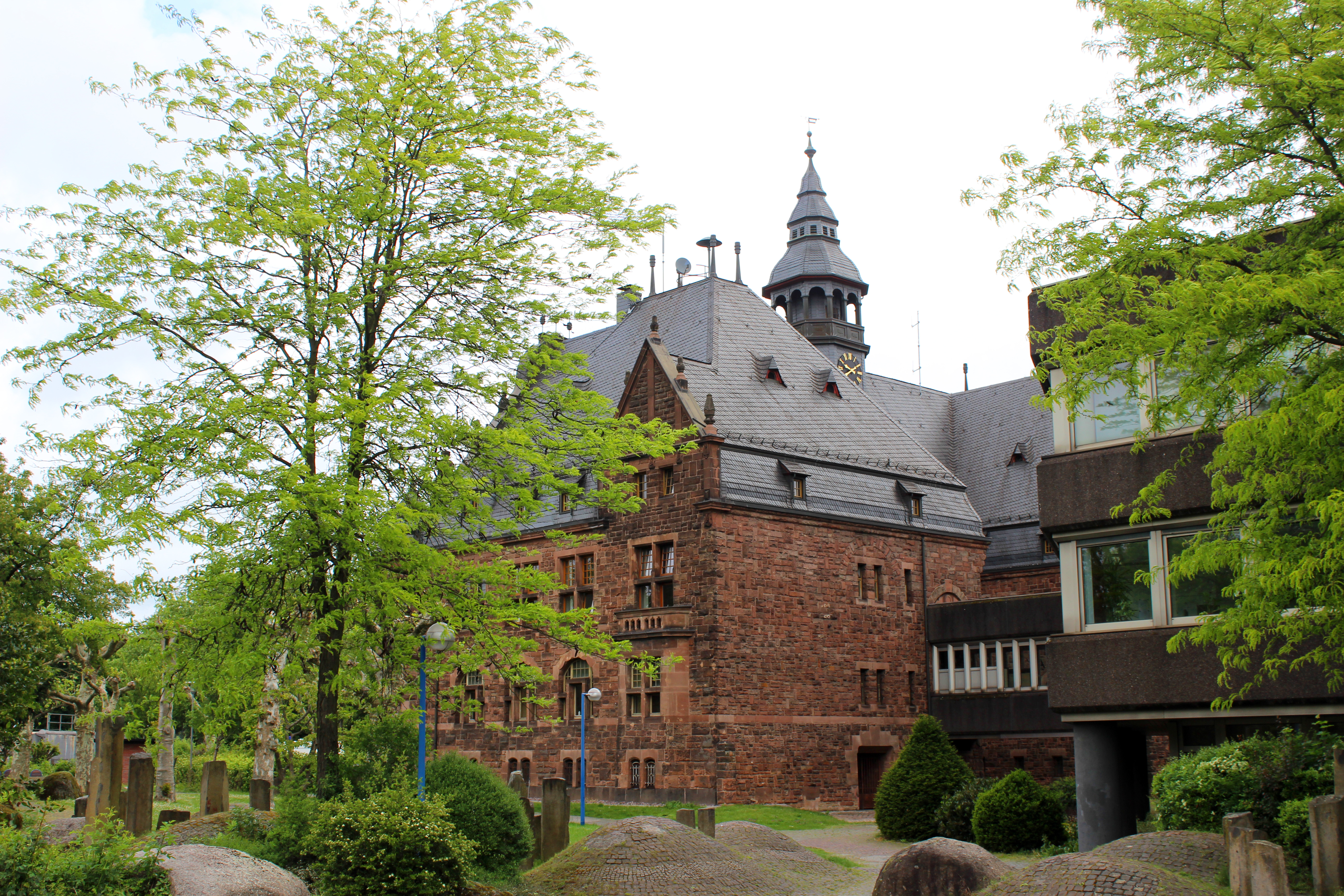 Dillingen, Landkreis Saarlouis, Saarland: Altes Rathaus, heute Polizeiinspektion Dillingen.